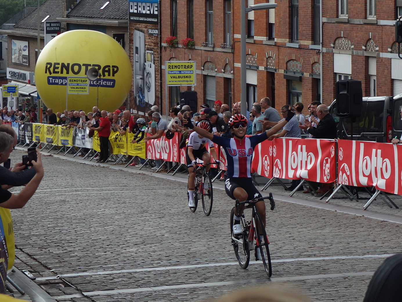 Coryn Rivera won de laatste etappe op de Vesten in Geraardsbergen van de Lotto Belgium Tour 2019